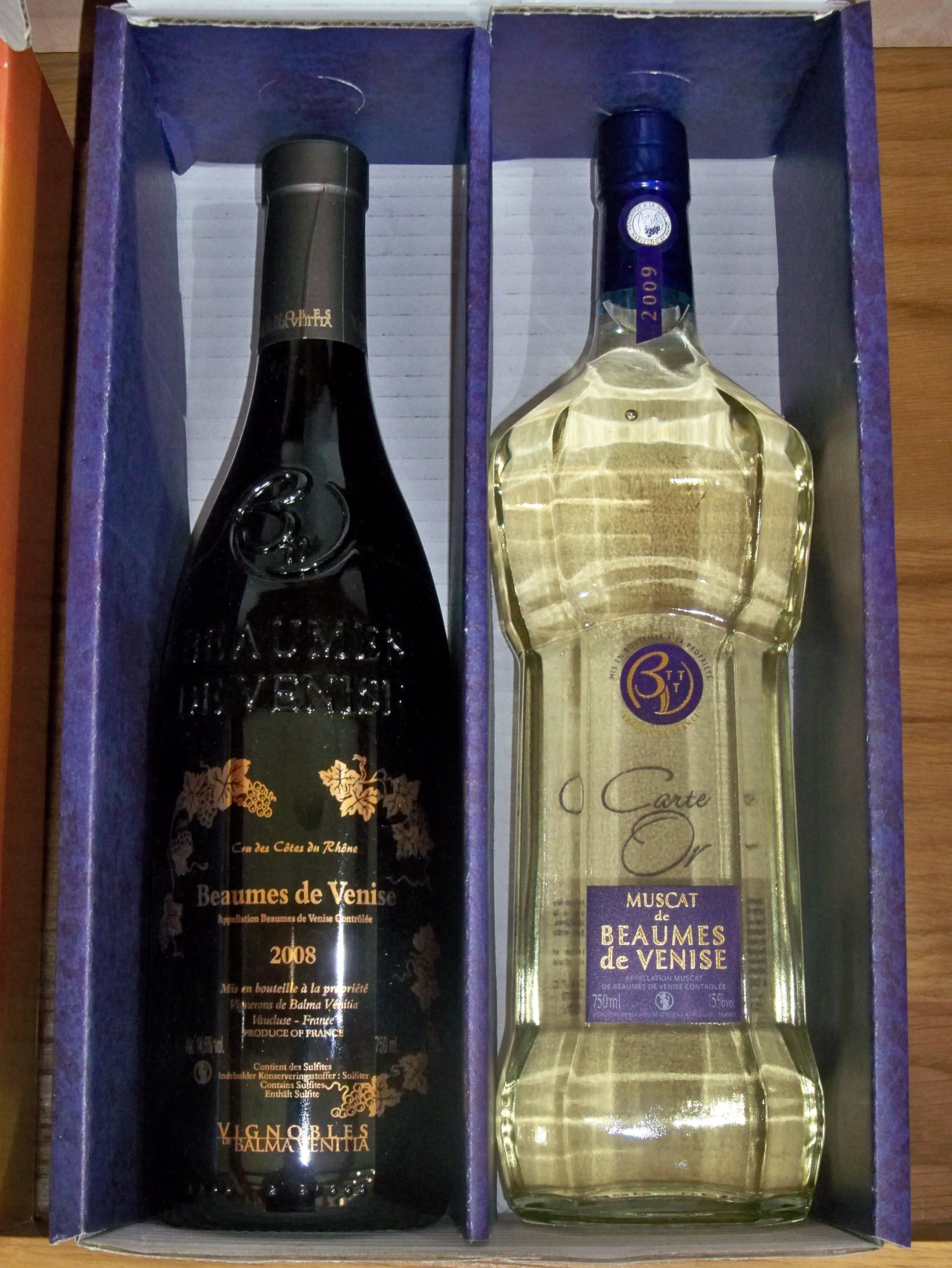 Balma Venitia (Carte d'Or) et Muscat de Beaumes de Venise, Vaucluse